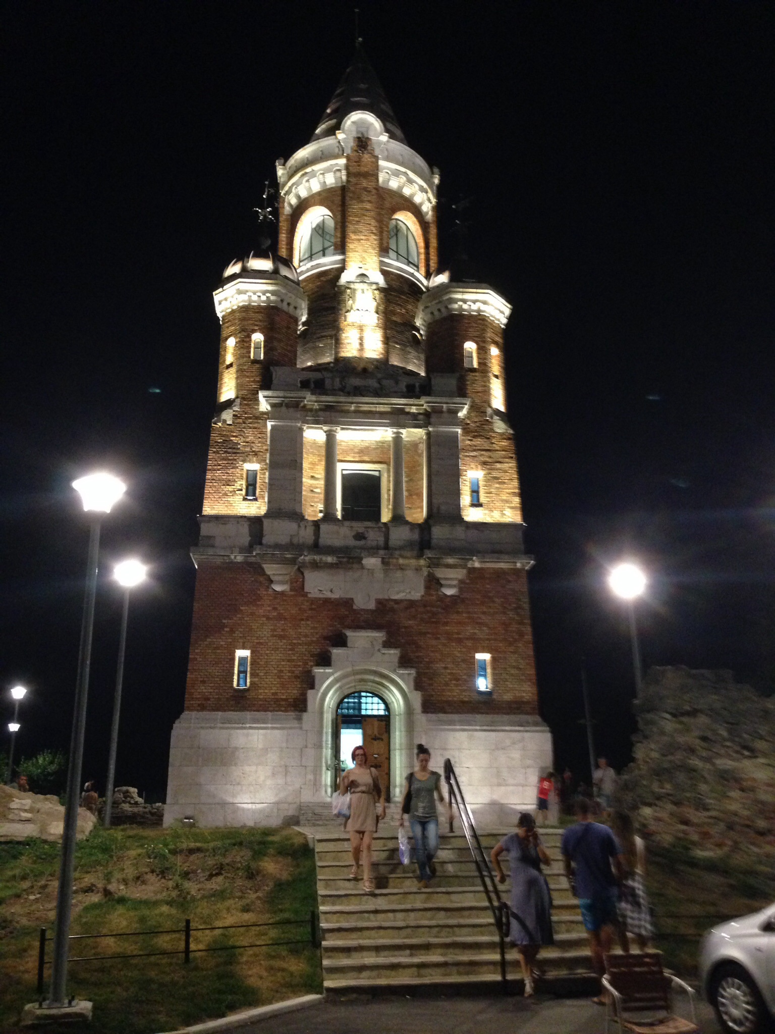 Srpski (latinica): Kula Sibinjanin Janka ili Kula Gardoš, Zemun, Srbija